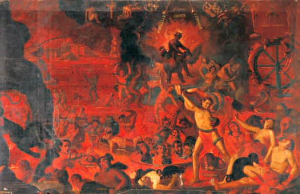 "El Infierno", óleo sobre lienzo del padre Hernando de la Cruz, pintor de la Escuela Quiteña de arte del siglo XVII. La obra está exhibida en la Iglesia de La Compañía de Jesús, de la ciudad de Quito.